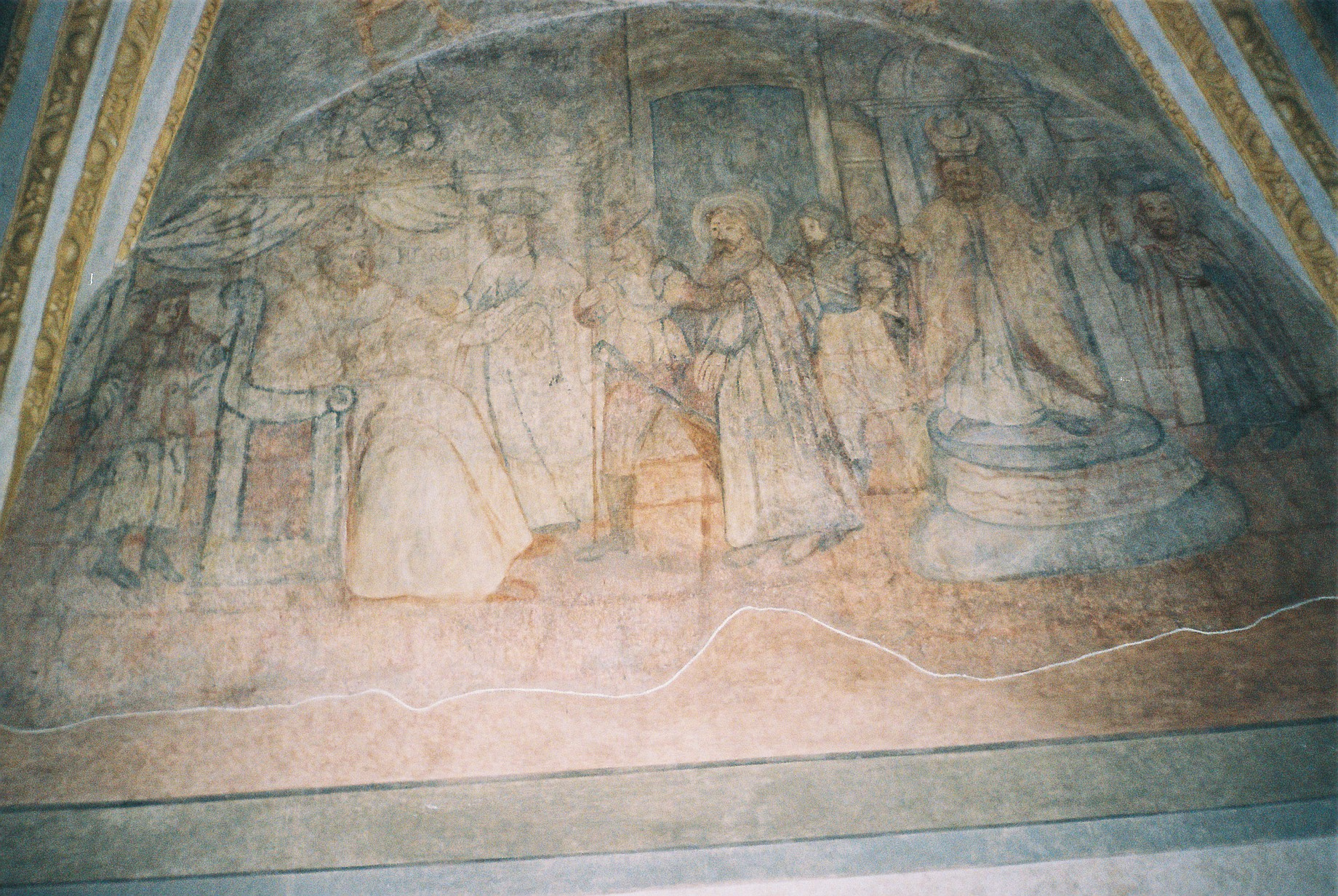 kamienica Gruszewiczów - wnętrze 14